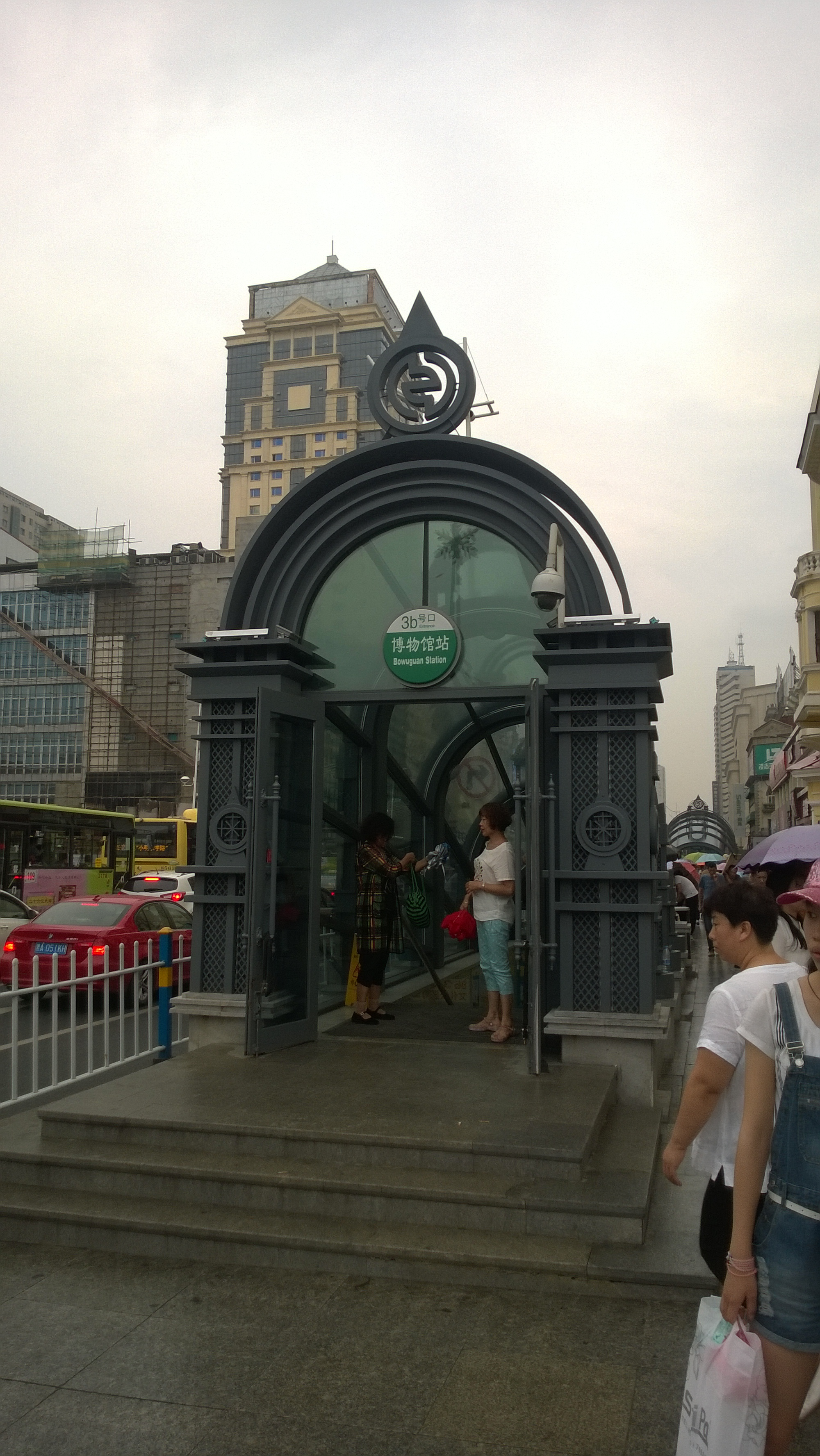 中文（中国大陆）: 哈尔滨地铁1号线博物馆站，3B出口